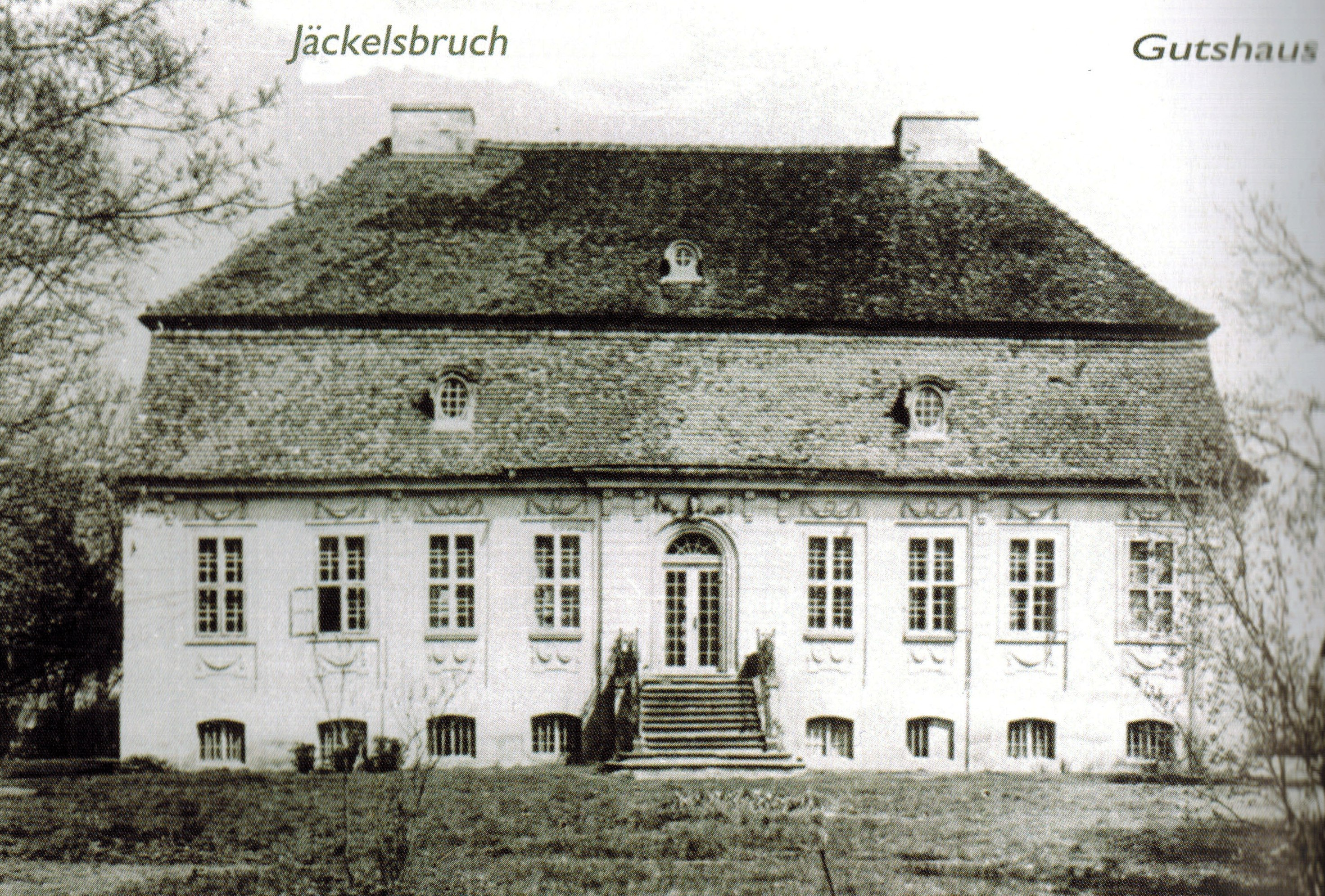 Gutshaus Jäckelsbruch bei Wriezen (1945 zerstört)